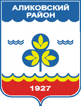 Герб Аликовского района